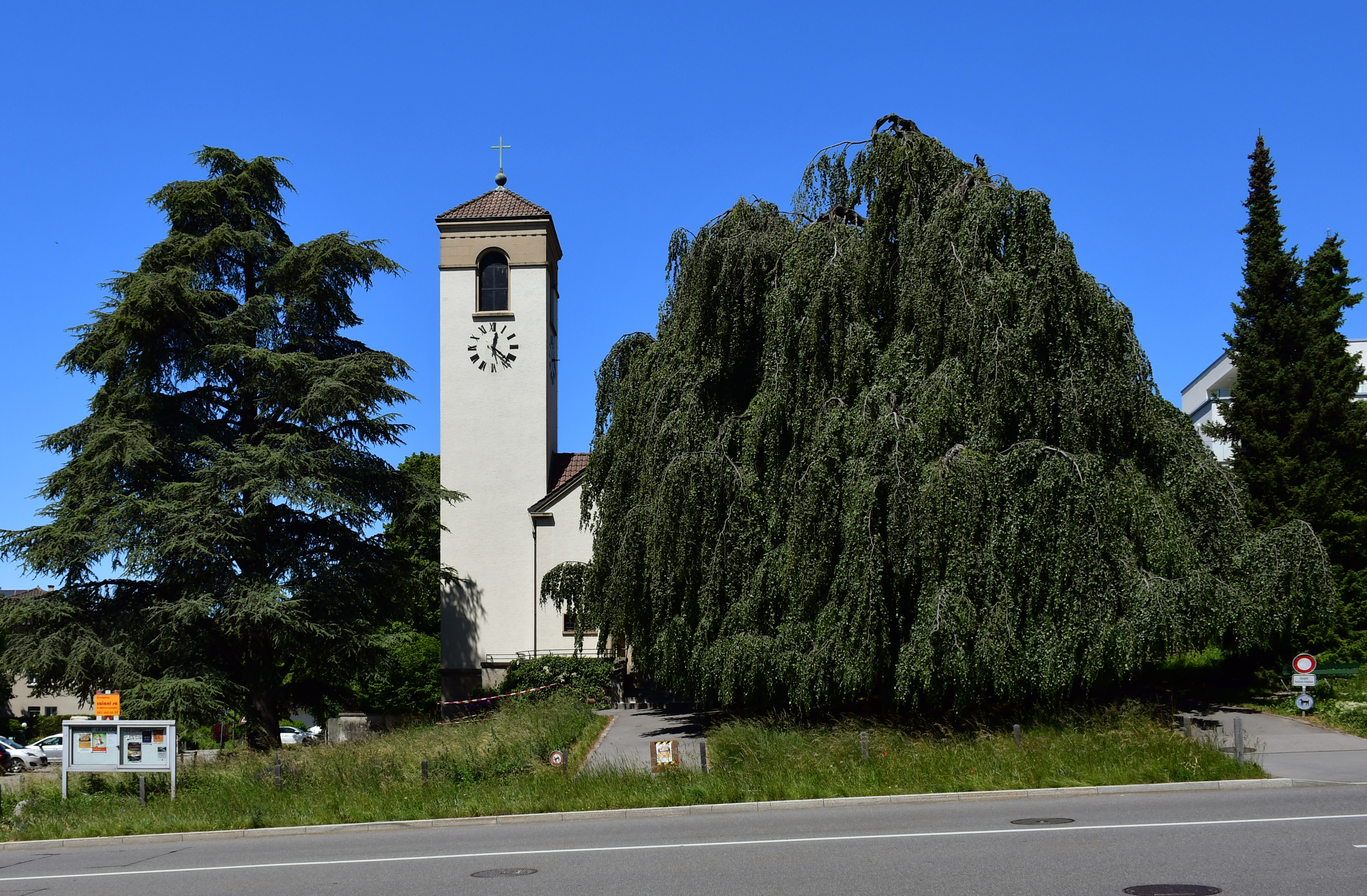 Église réformée de la Sallaz-Vennes (Lausanne, Suisse), sur la route de Berne.